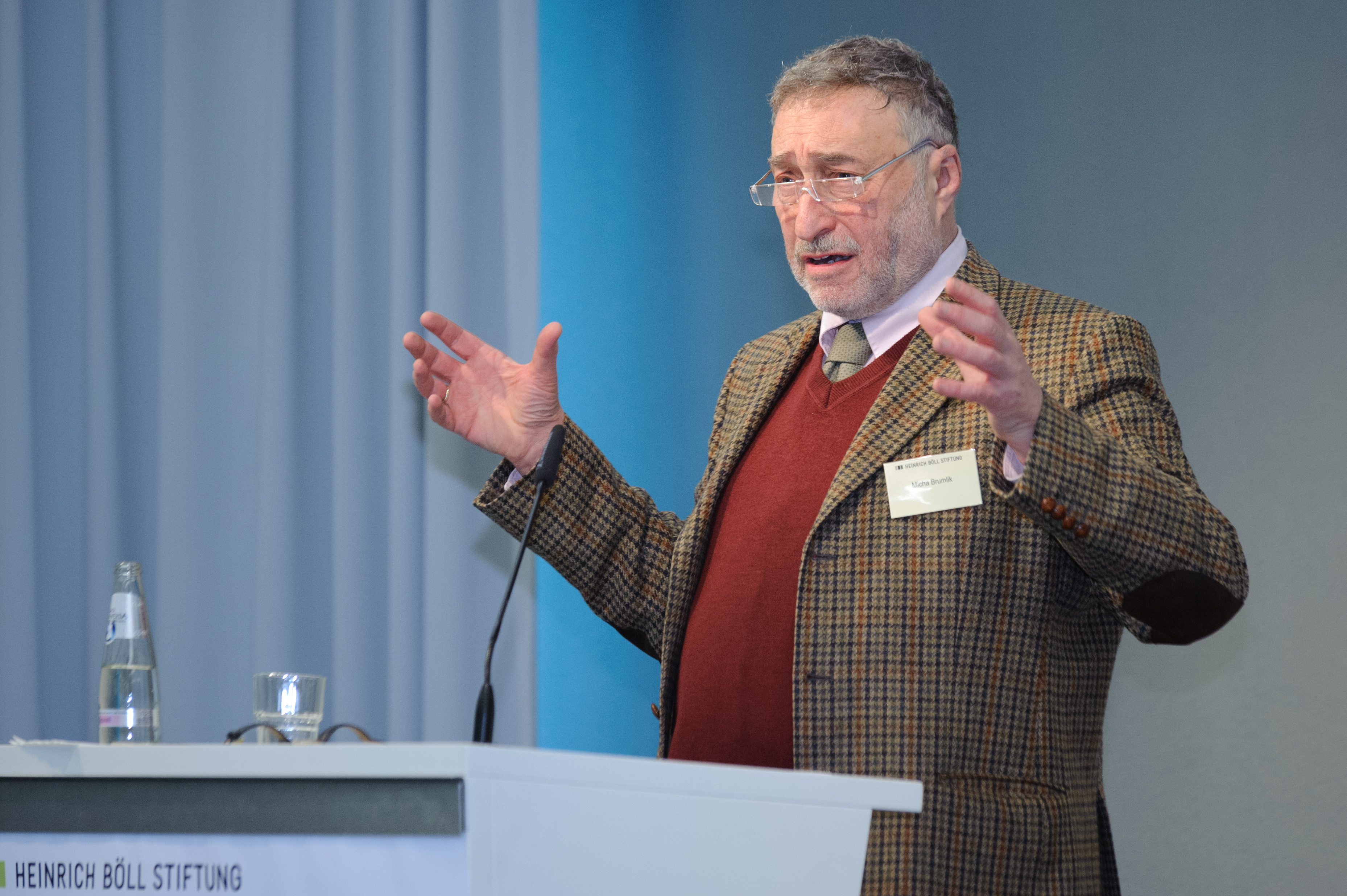 Micha Brumlik (Erziehungswissenschaftler und Publizist, Uni Frankfurt a.M.) Konferenz: Fremde Freunde?